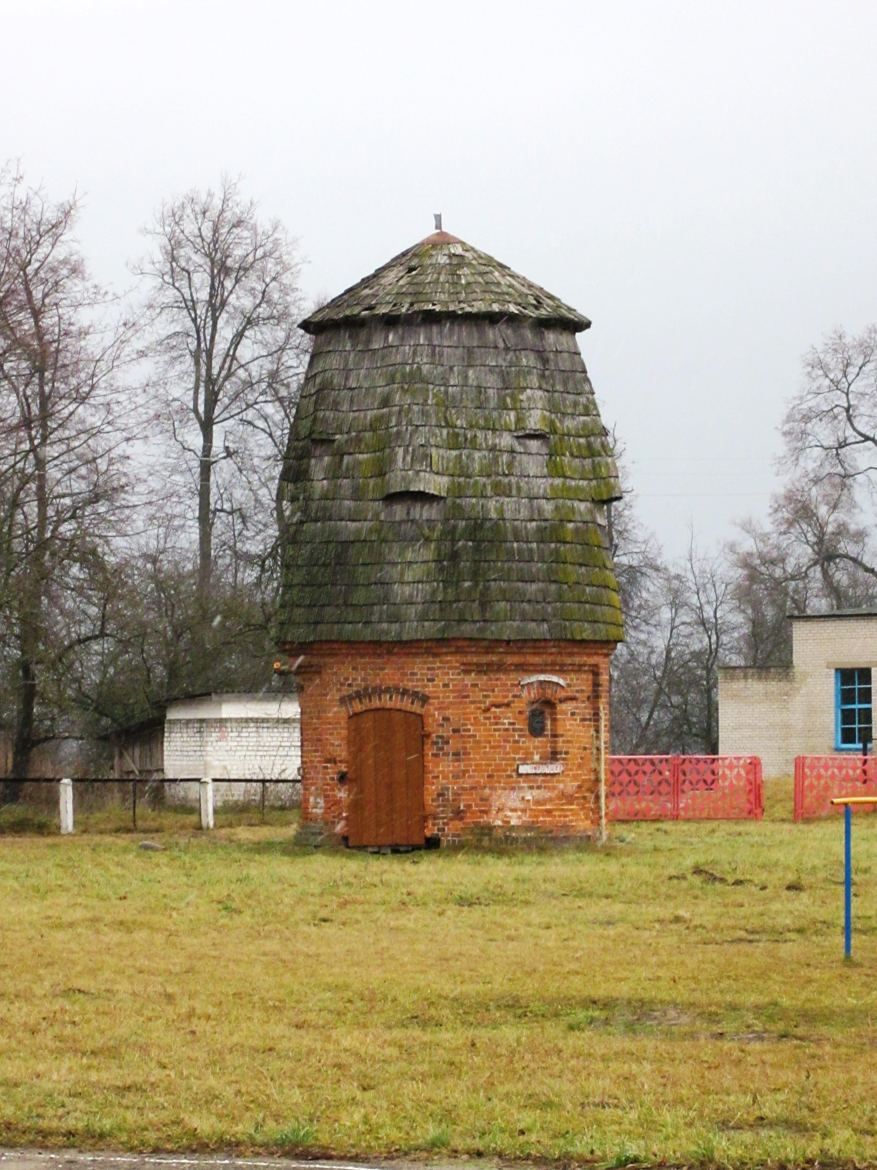 Беларуская (тарашкевіца): Фрагмэнты ансамбля былога палаца Храптовічаў:флігельвяндлярняпаркбібліятэка. в. Шчорсы This is a photo of Belarusian heritage monument. Reference number: 412Г000467 ( WLM)